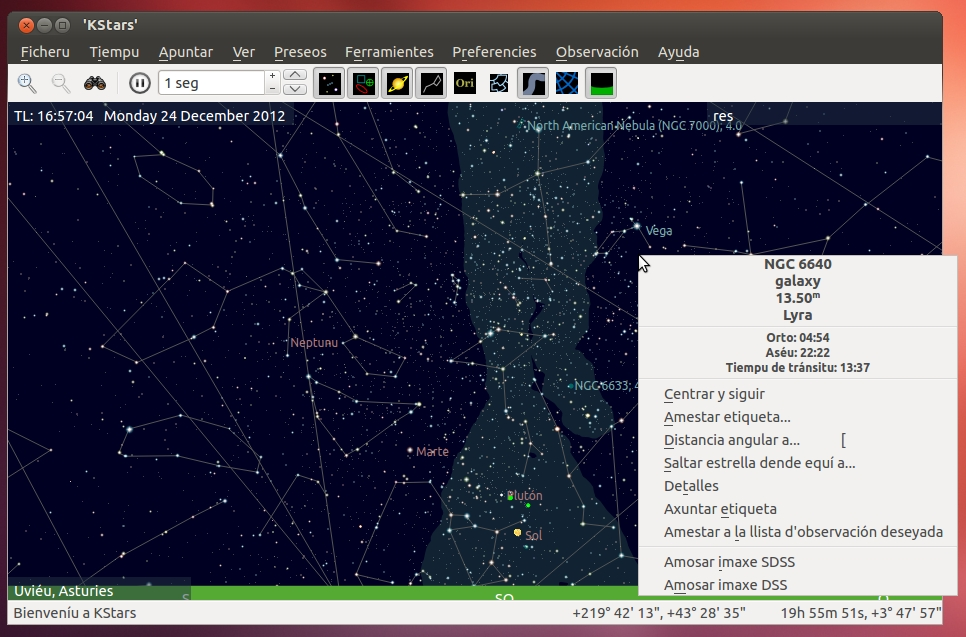 captura pantalla n'asturianu